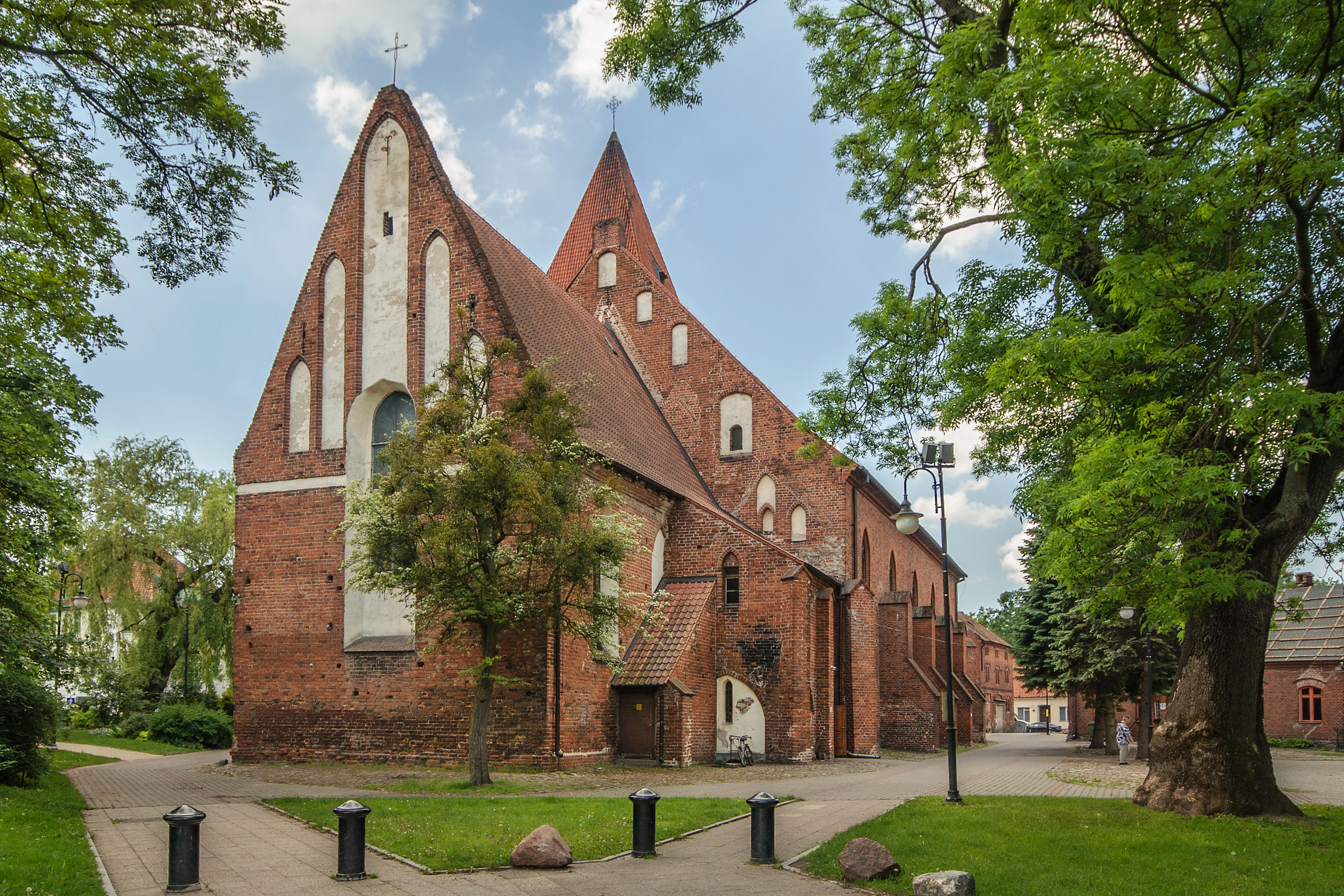 Pasłęk, kościół par. p.w. św. Bartłomieja, 1 poł. XIV, 1543-1546, 1746-1751, 1860-1874